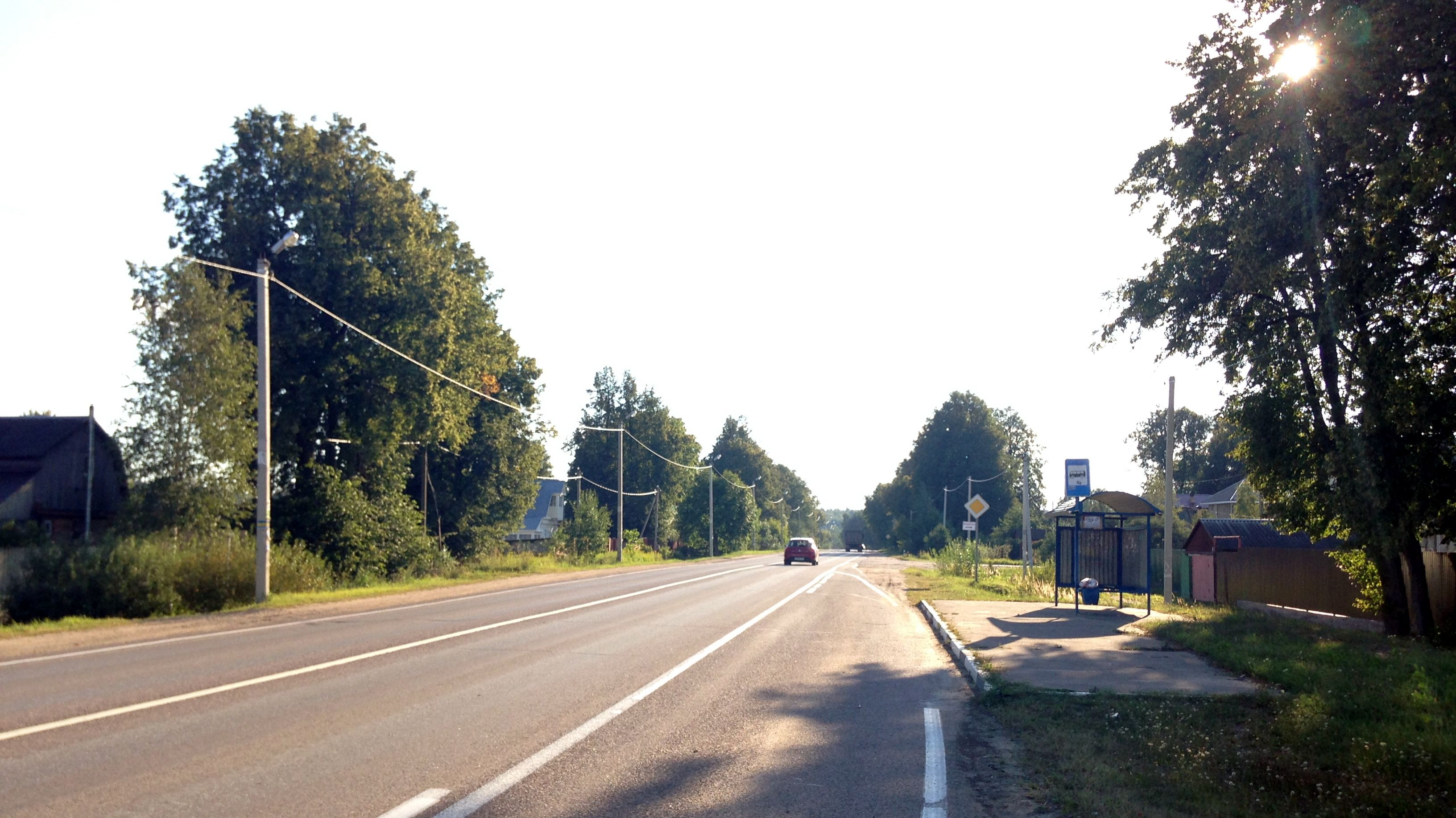 Локотня (Одинцовский район, Московская область, Россия).